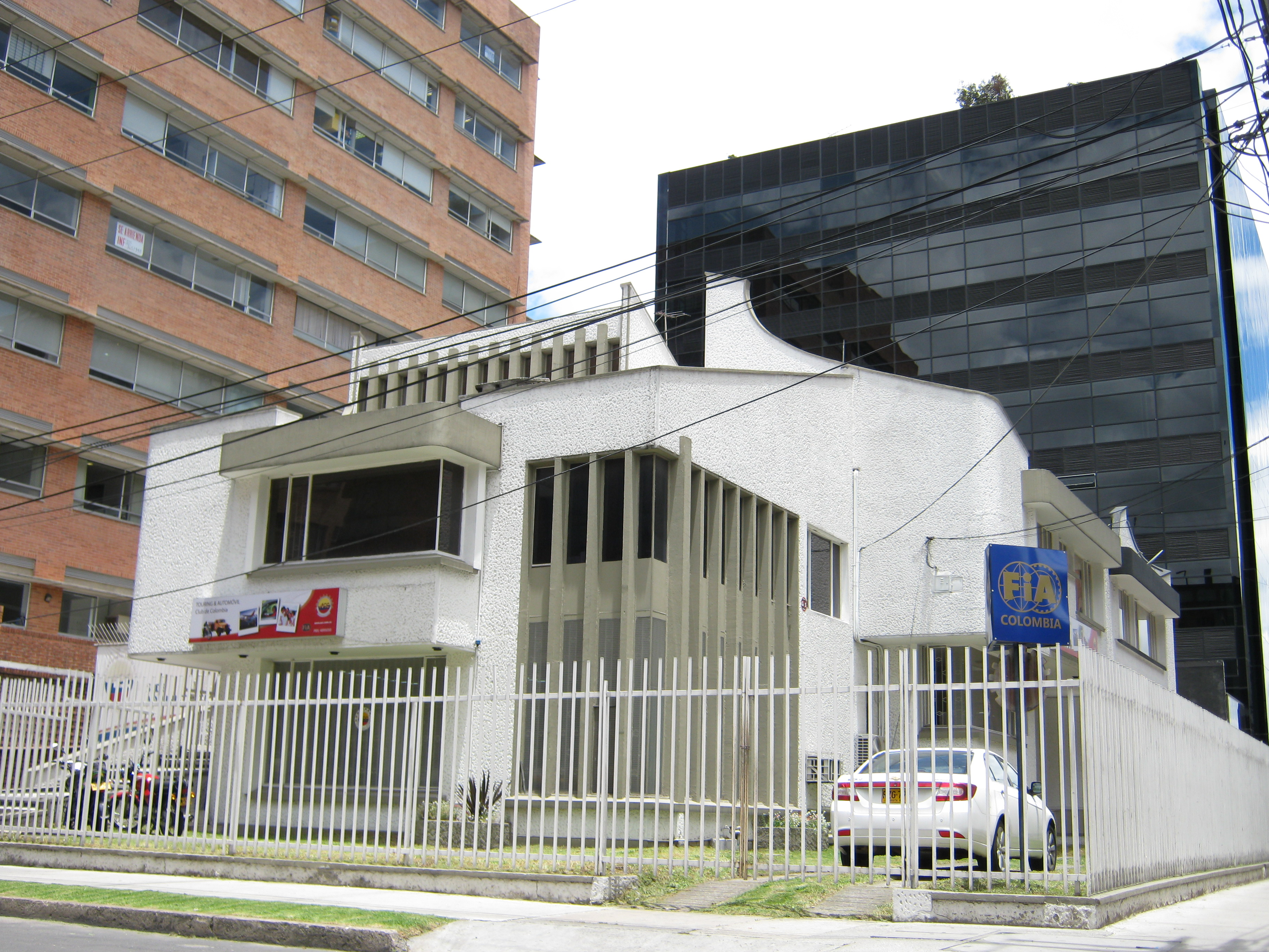 Sede Automovil Club de Colombia